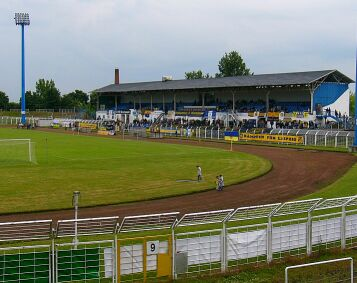 Bruno-Plache-Stadion mit Tribüne im Juni 2005